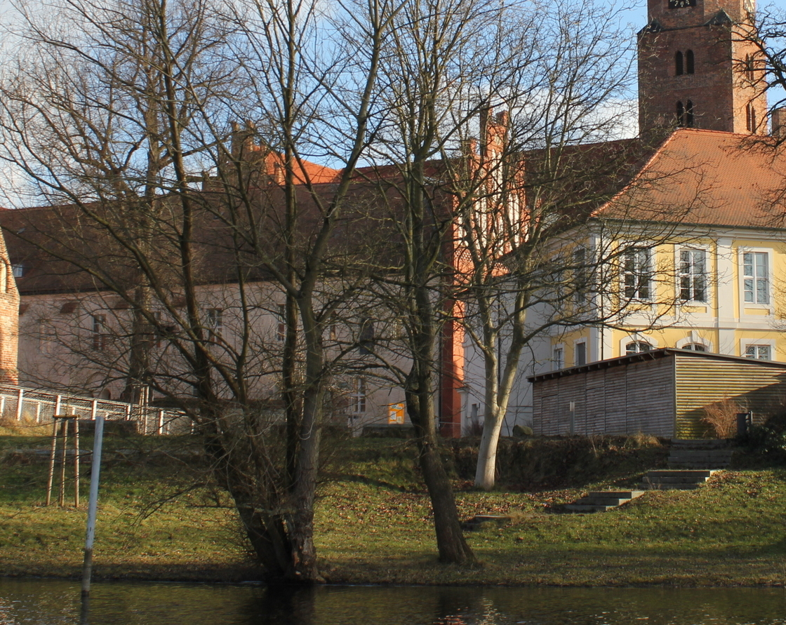 Nordflügel der brandenburger Domklausur, vom Wasser aus gesehen